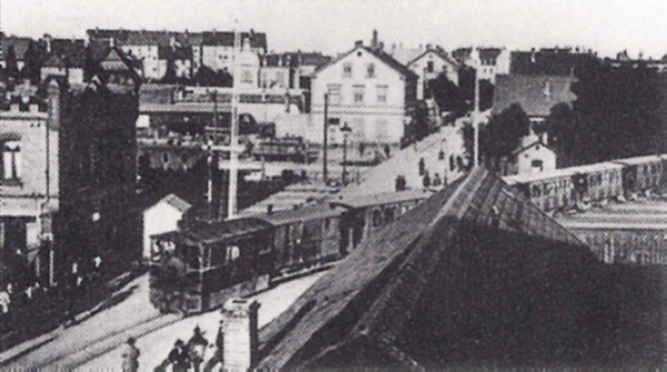 Lokalbahn nach Großkarlbach in Frankenthal am Heßheimer Bahnübergang vor dem Ersten Weltkrieg